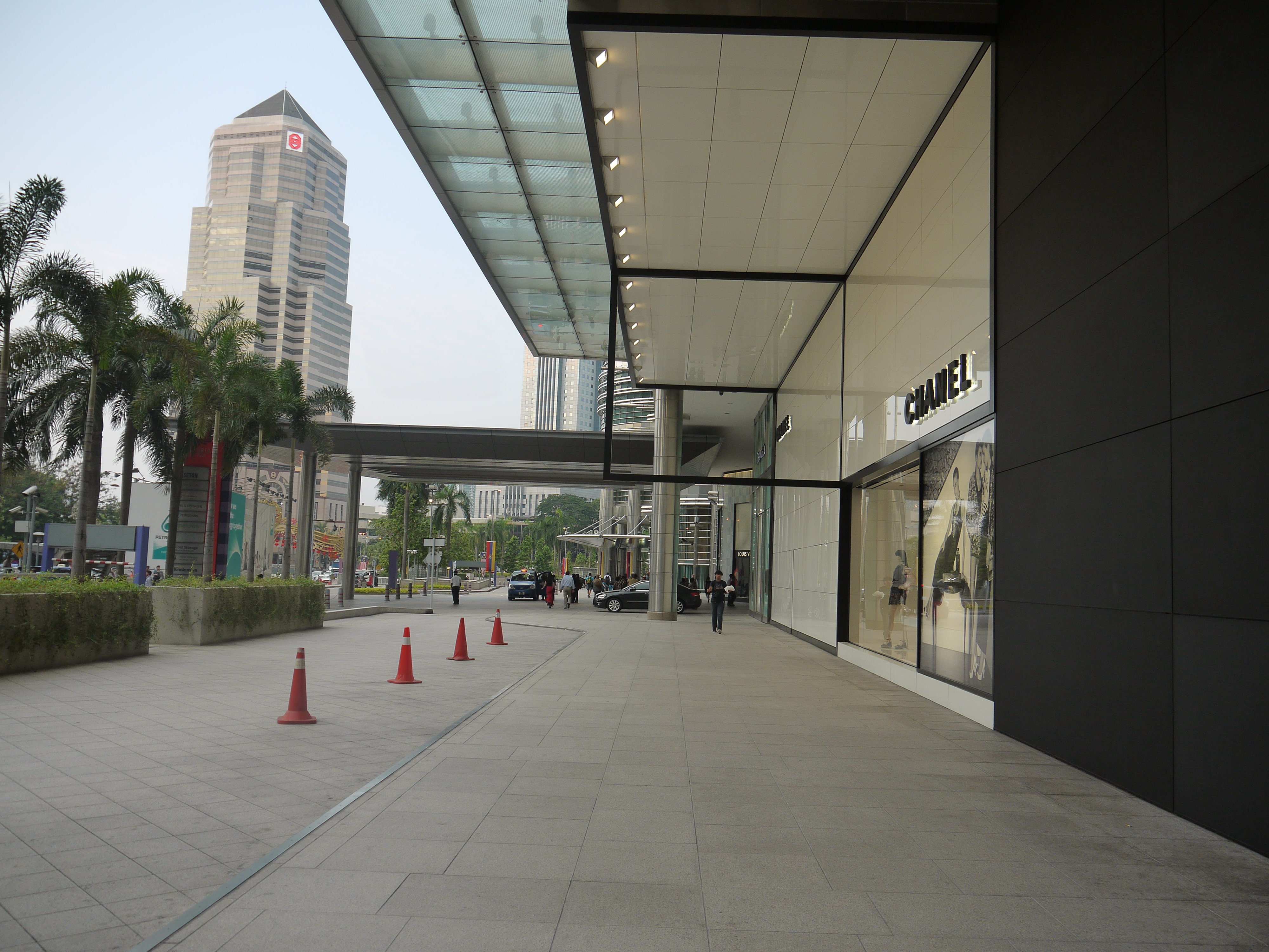 Suria KLCC Lot C exterior